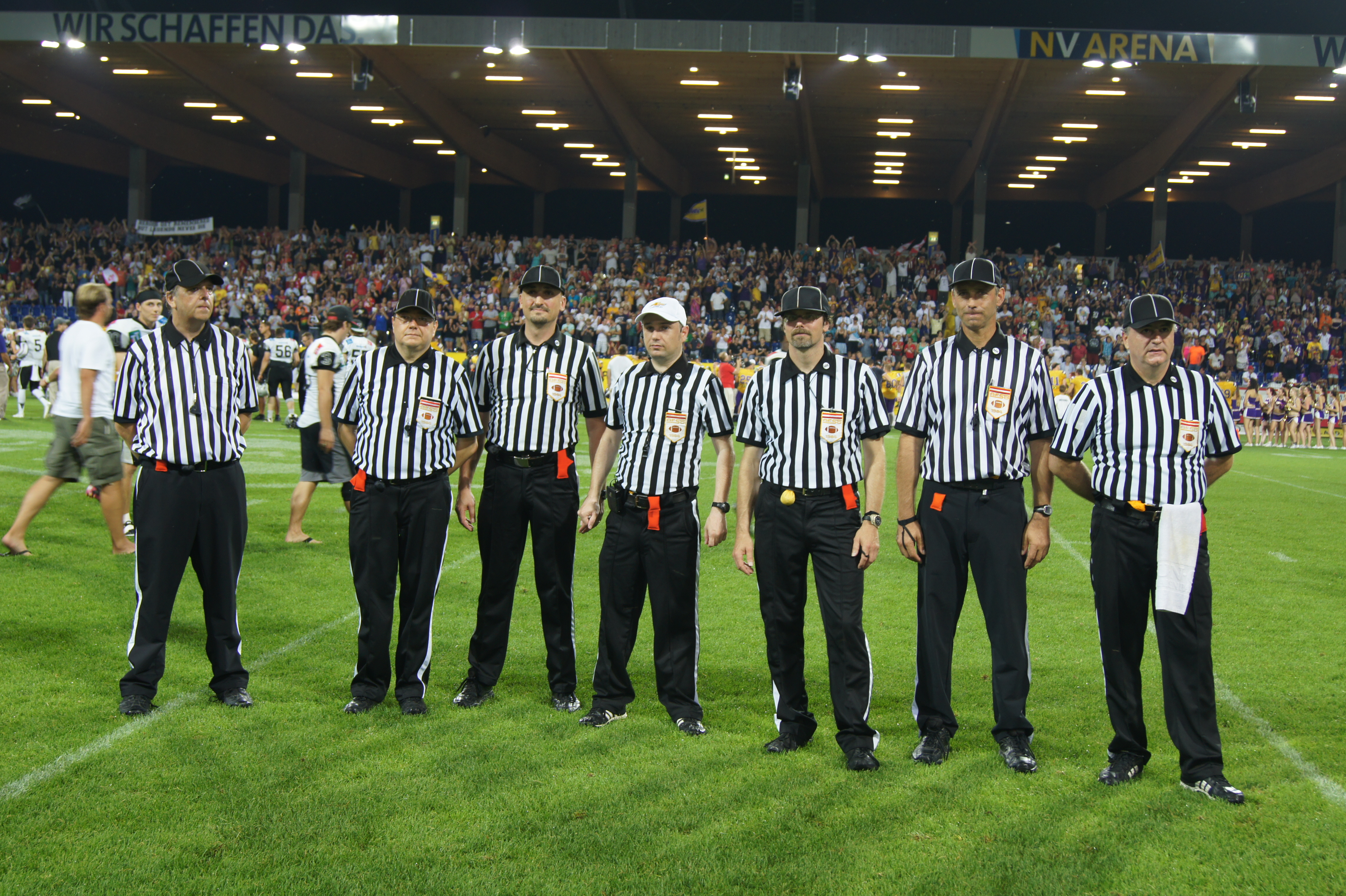 Austrian Bowl XXIX in der NV Arena in St. Pölten